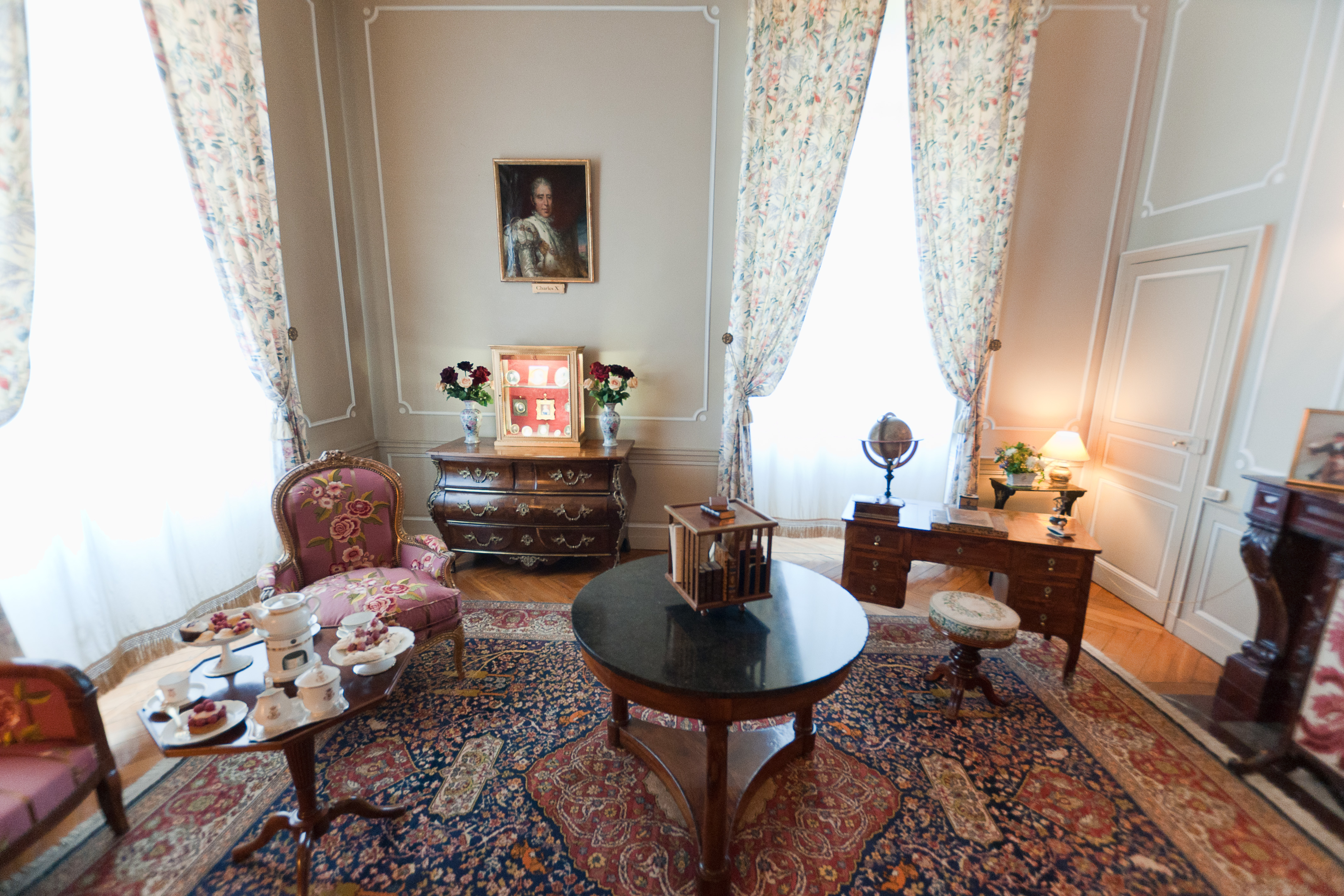 Chateau de Cheverny - Petit Salon